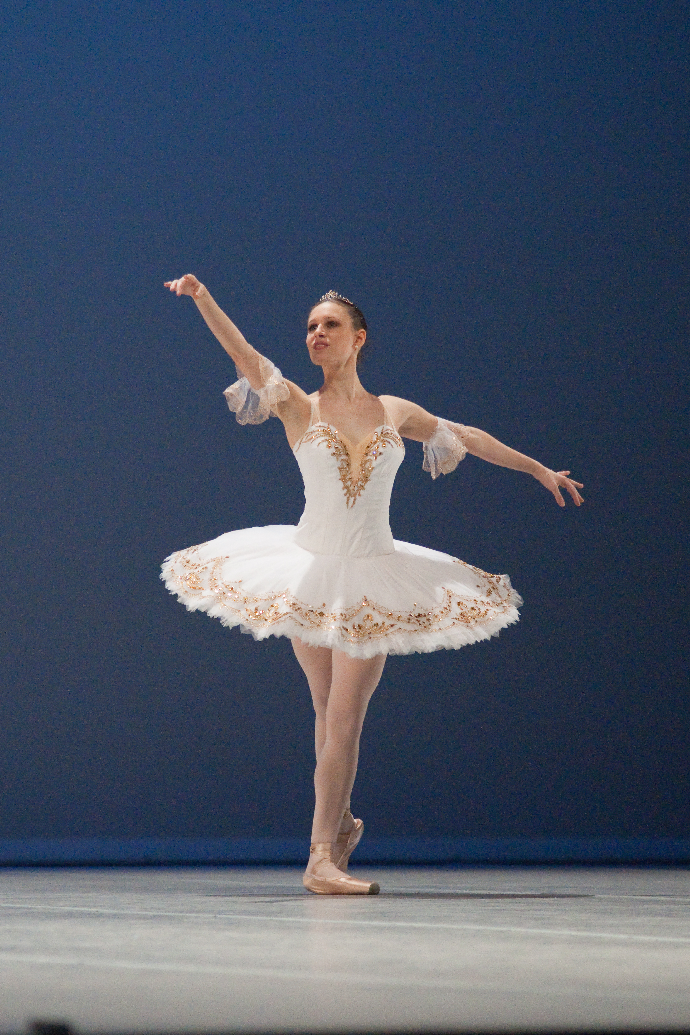 Variation extraite de Raymonda au Prix de Lausanne 2010. The making of this document was supported by Wikimedia CH. (Submit your project!) For all the files concerned, please see the category Supported by Wikimedia CH.